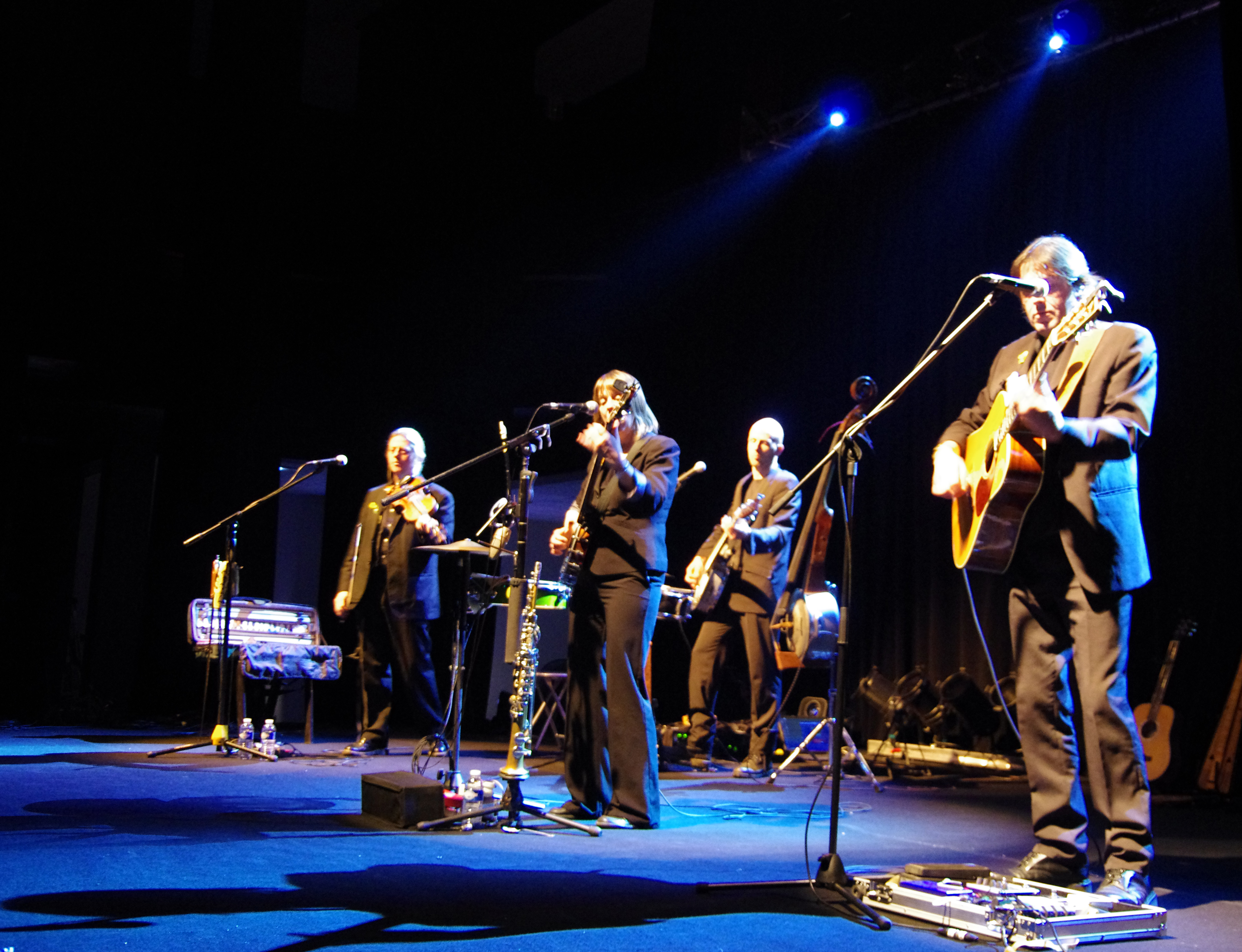 Corbie (Somme, France) - Soirée de 2 concerts dans la salle "Les Docks" pour la fête de Saint-Patrick. Les Churchfitters sont sur scène.